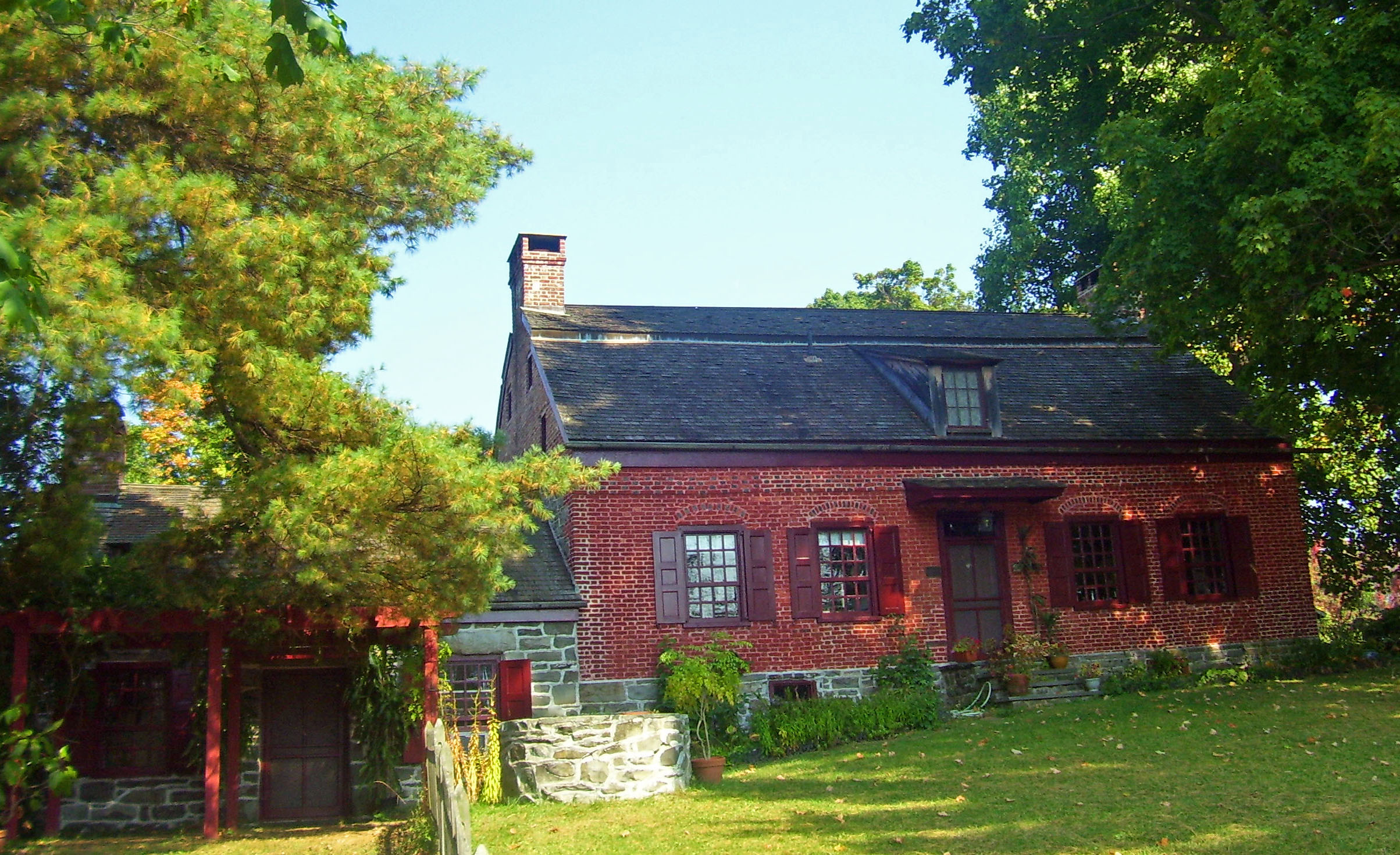 Shuart-Van Orden Stone House in Plattekill, NY, USA